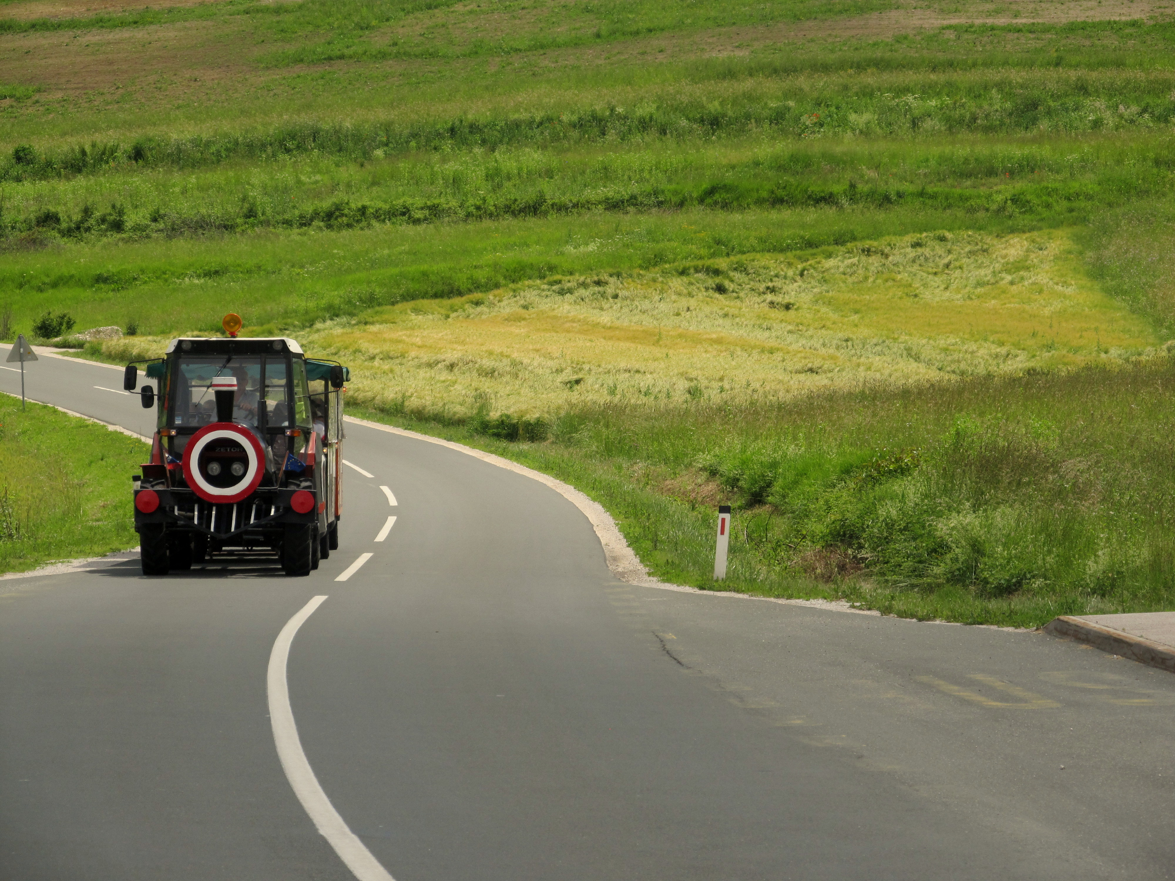 turistični vlak